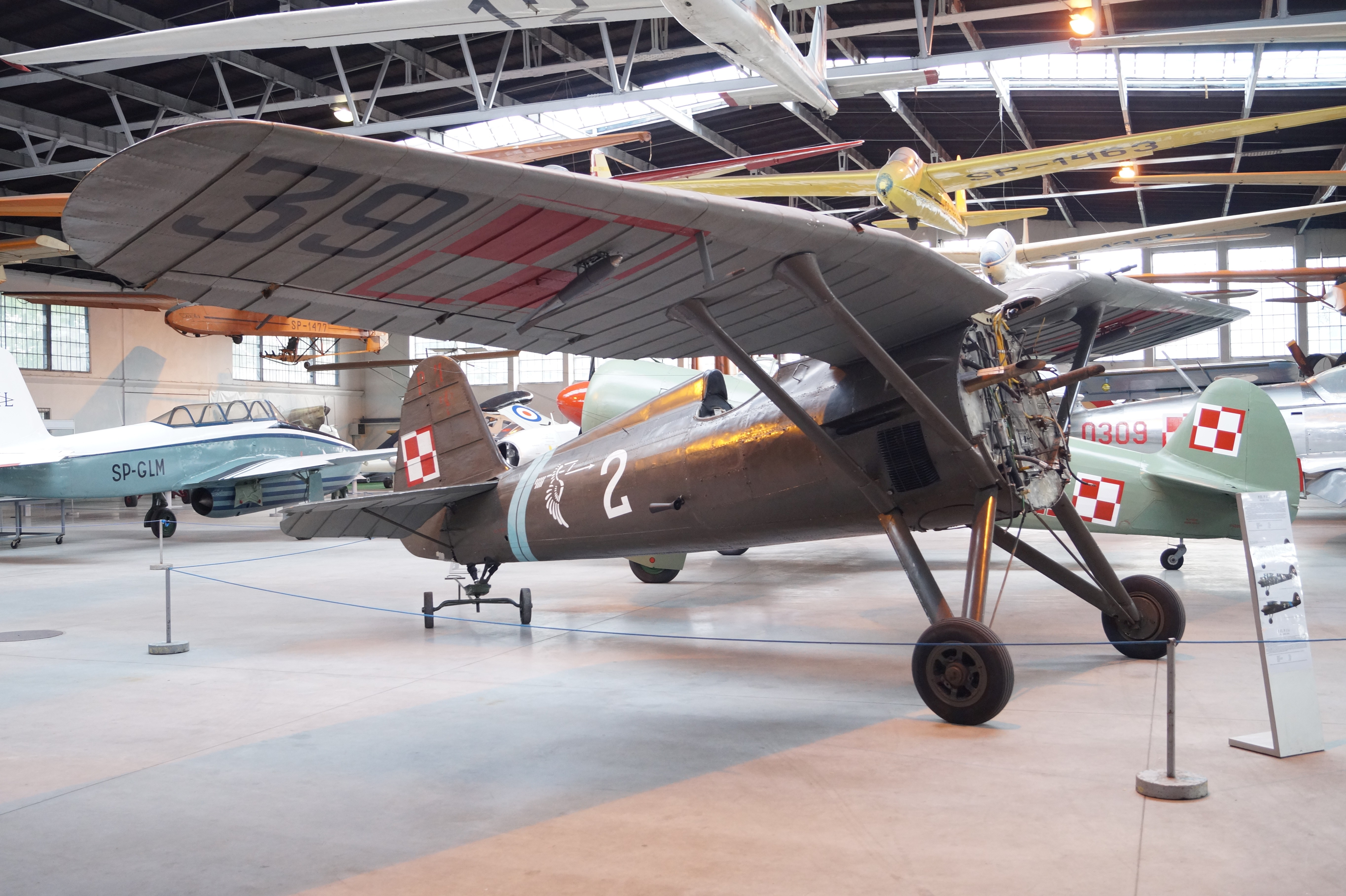 This photo was taken during Automotive Wikiexpedition 2016 set up by Wikimedia Polska Association. You can see all photographs in category Wikiekspedycja motoryzacyjna 2016. English | Polski | +/− Samolot myśliwski PZL P.11 w Muzeum Lotnictwa Polskiego w Krakowie